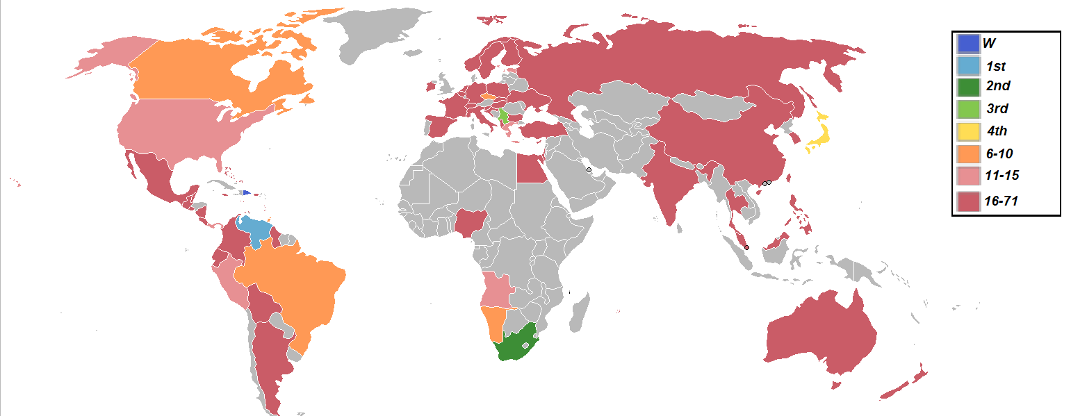 jejejejejeje